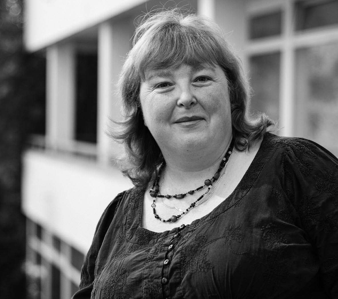 Martina Roeselová Foto: Národní kontaktní centrum - gender a věda / Michal Ureš